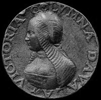 Immagine di Vittoria Colonna vedova medaglia coniata